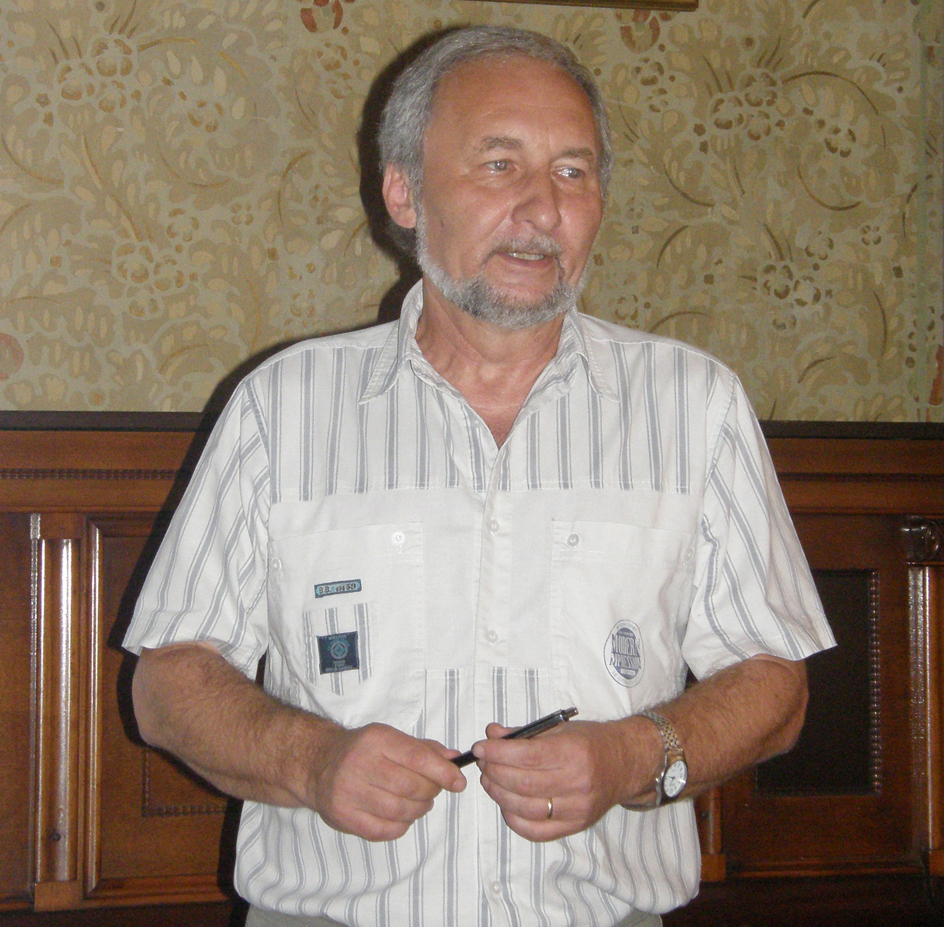 Archeolog PhDr. Petr Holodňák v roce 2015 na přednášce v žatecké Křížově vile